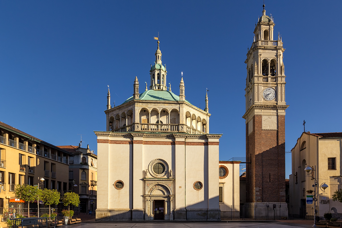 Santuario di Santa Maria di Piazza This is a photo of a monument which is part of cultural heritage of Italy.